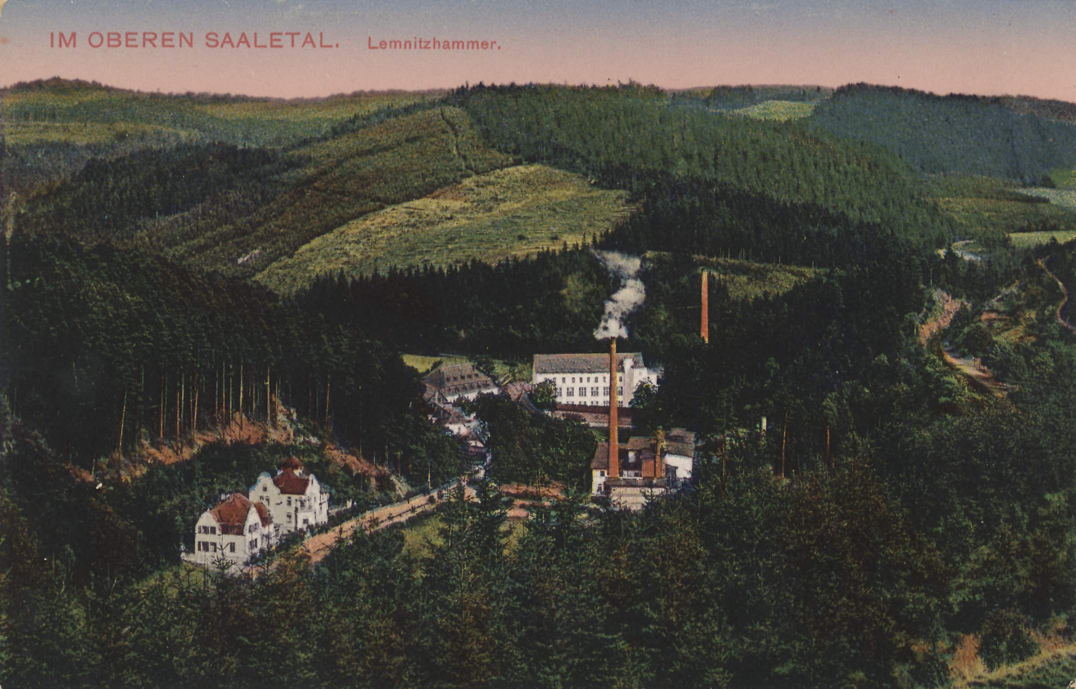 Ortansicht von Lemnitzhammer